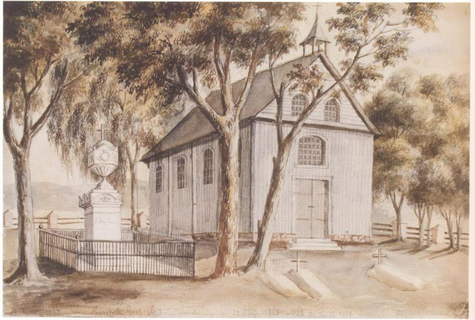 Беларуская (тарашкевіца): Болтуп (Bołtup), Гароднікі (Harodniki). Капліца